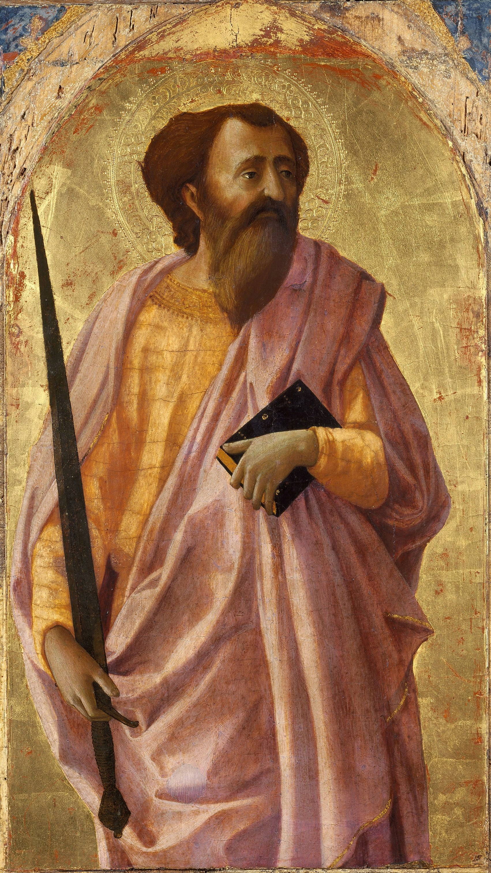 Masaccio, polittico di pisa, san paolo, pisa 51x30 cm